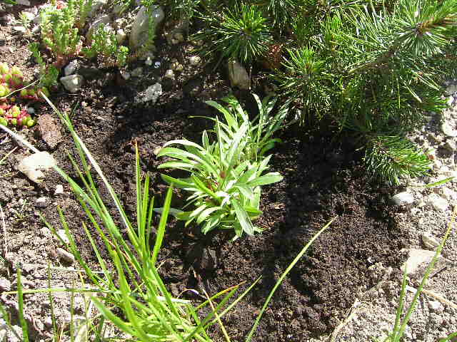 Havasi gyopár egy várpalotai kertben